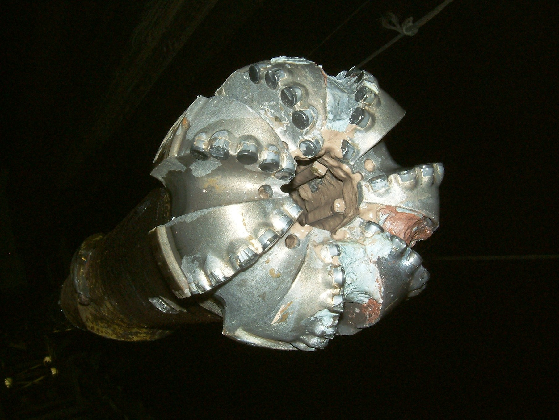 PCD-Meissel nach dem Ausbau aus dem Bohrloch